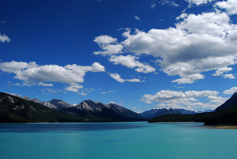 Canada, Laghi dell'Alberta, Lago Abraham.